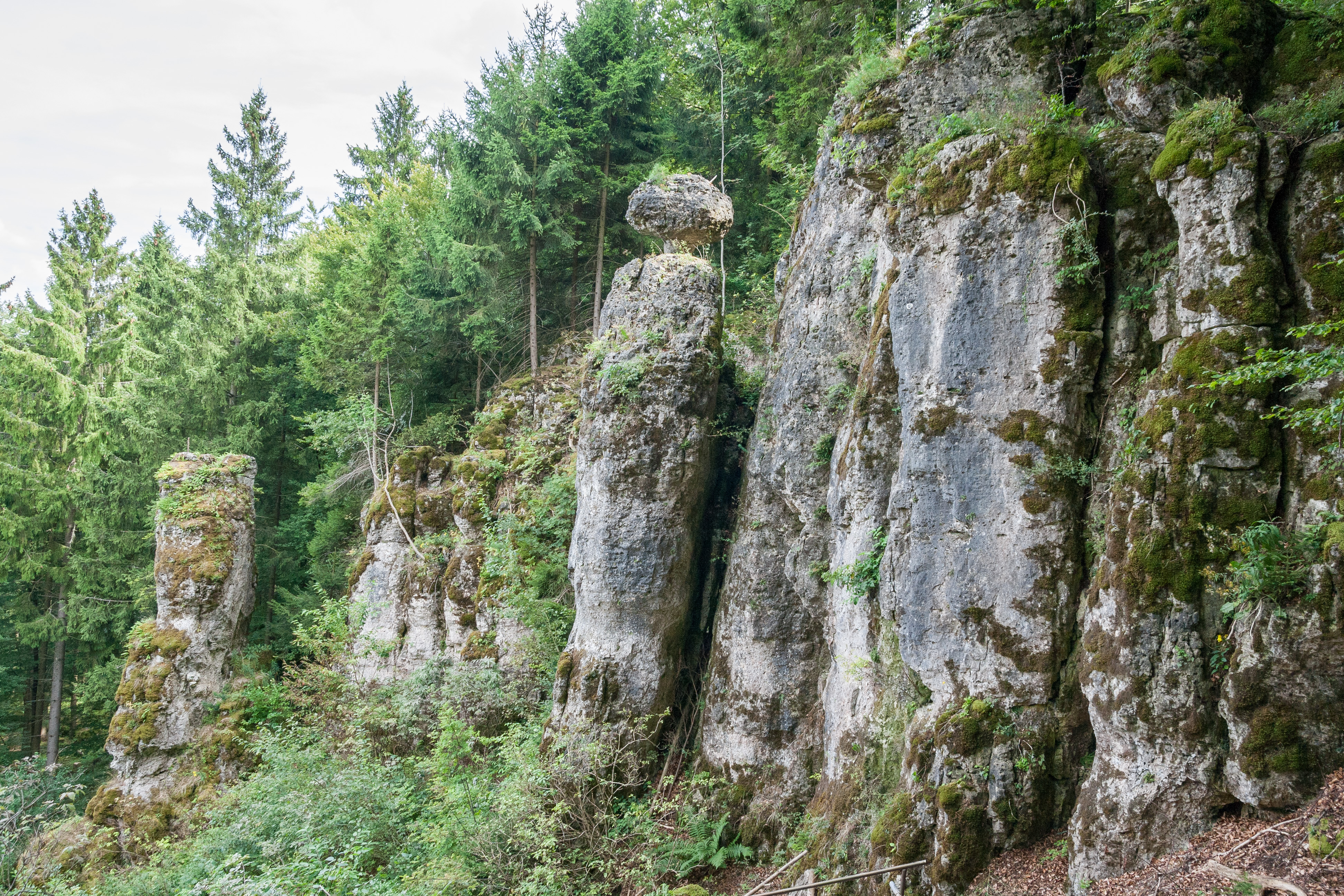 Felsturm, Schwammerl, St. Colomann, Velburg, Geotop